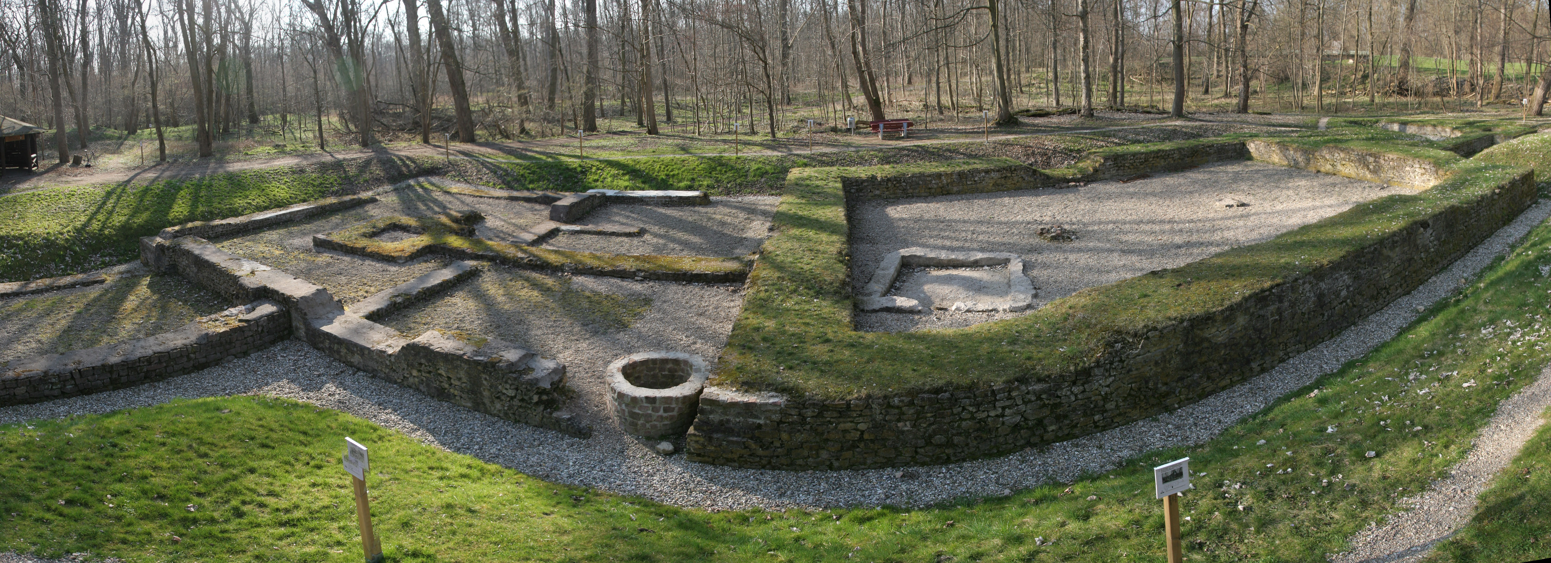 Burg Stein (Hessen). 180° Panorama zusammengesetzt aus vier Bilder. (f 17 mm)